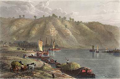 Stahlstich. Gezeichnet von Robert Batty, gestochen von Edward Goodall (1795–1870). London, published March 1, 1827, by R. Jennings